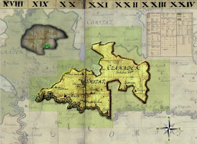 Comitatul Cenad in Harta Iosefină a Regatului Ungariei, 1782-85.